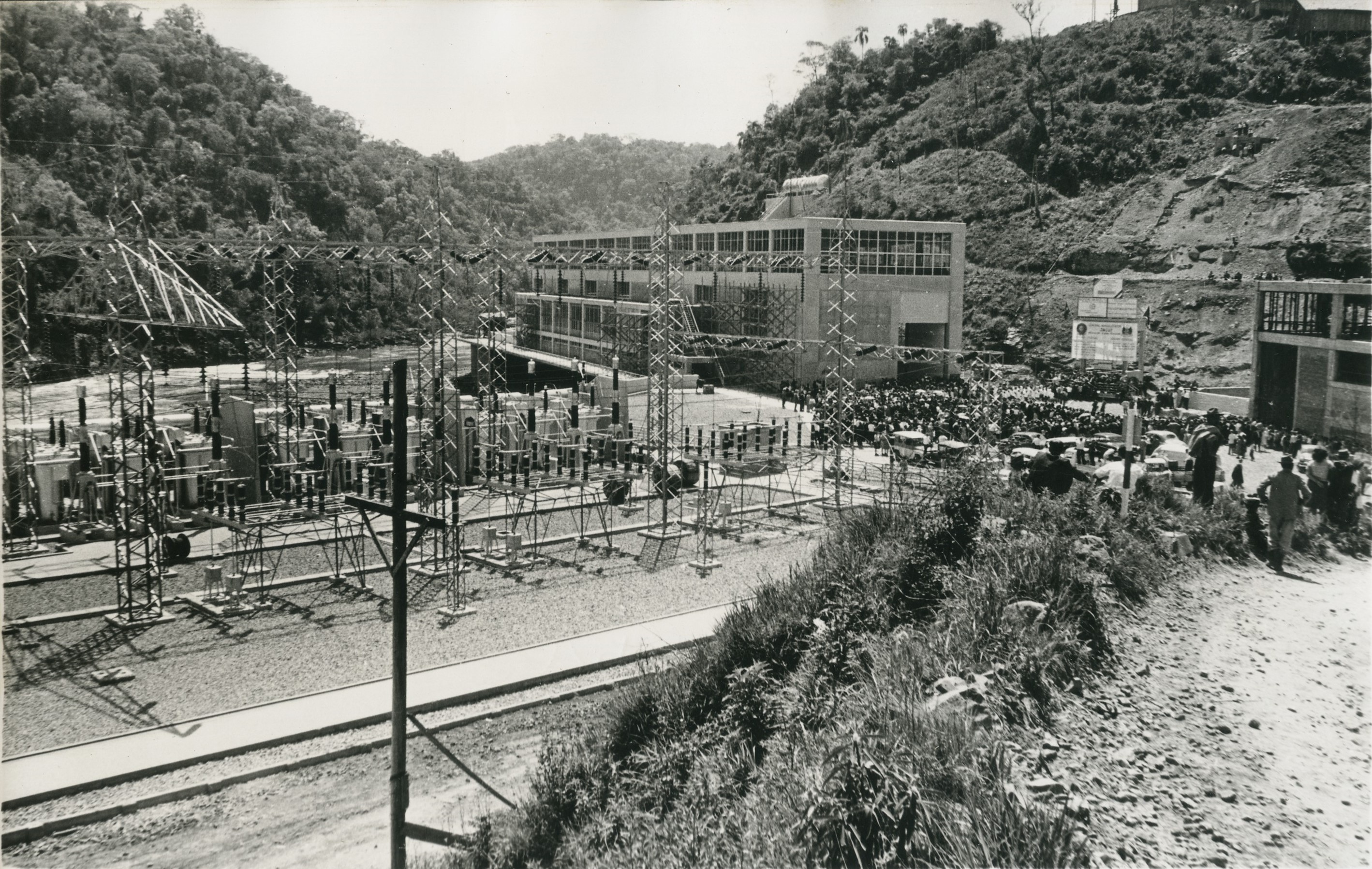 Fotografia do Fundo Correio da Manhã, sob a guarda do Arquivo Nacional.